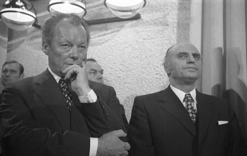 Einweihung des Anbaus der Landesvertretung Baden-Württemberg in der Schlegelstraße Bonn